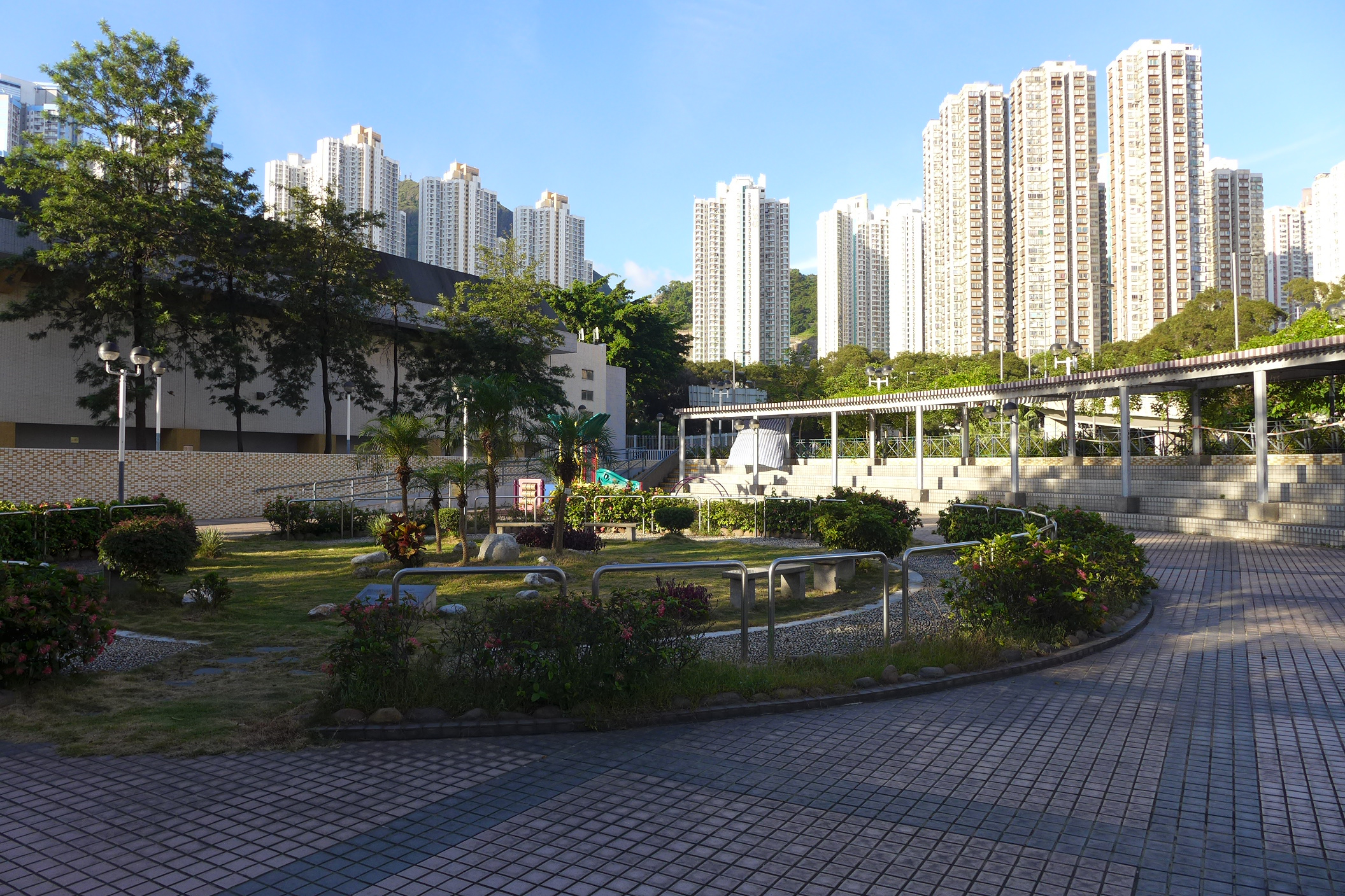 Kowloon Bay Park Phase 1